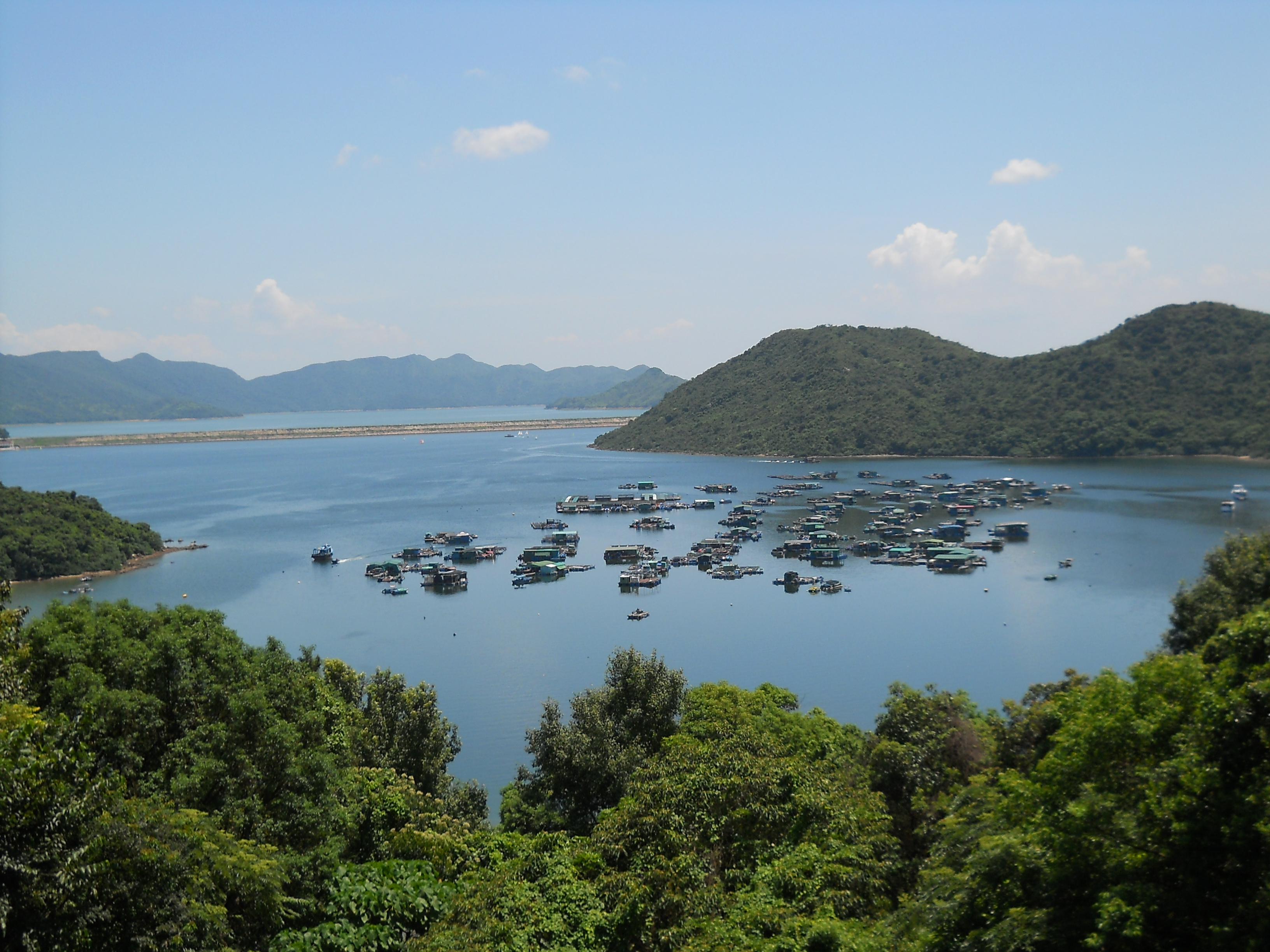 中文（香港）: 鹽田仔（東部）魚類養殖區